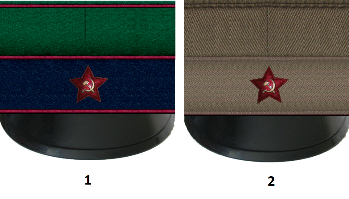 Фуражки ГПУ22